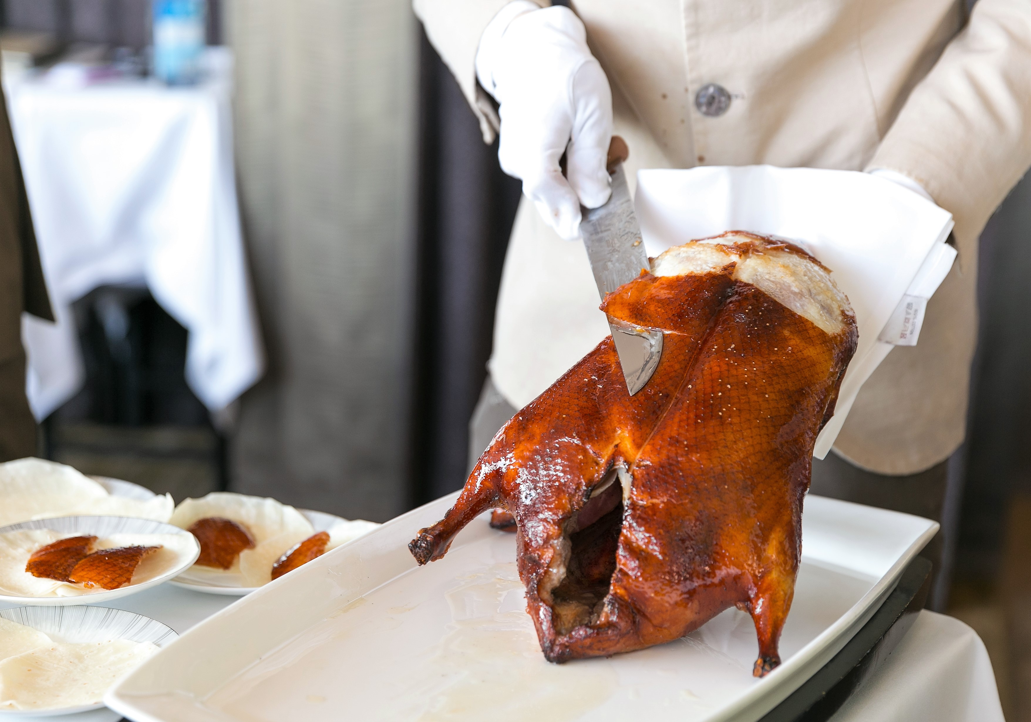 Tranchieren einer gebackenen Pekingente am Tisch des Gastes im Restaurant Yan Toh Heen im Hotel InterContinal Hong Kong in Hongkong, hier beim Abschneiden der Haut in Rauten.